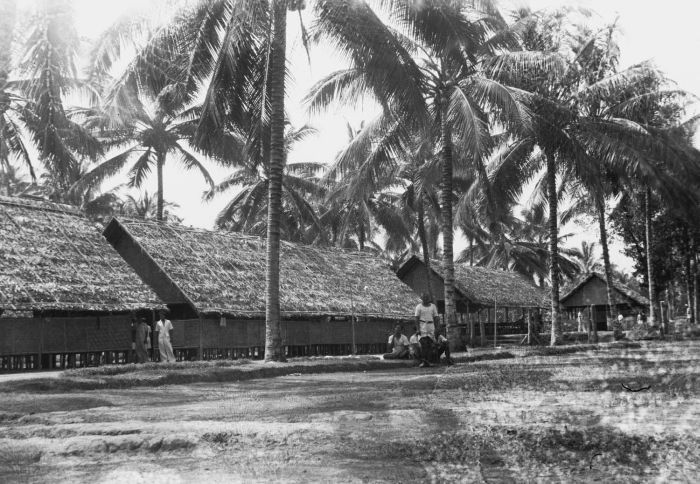 negatief. Kazerne in Mengwi